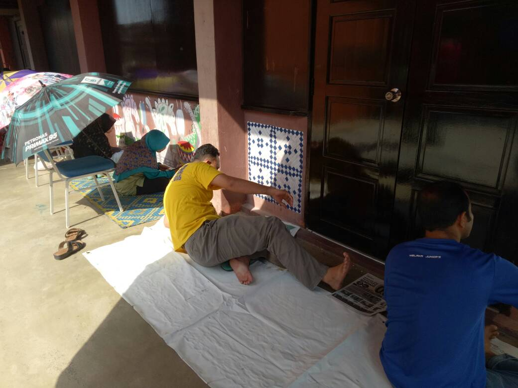 Sampai Kejang Kaki Ye, Cikgu Fadlizan